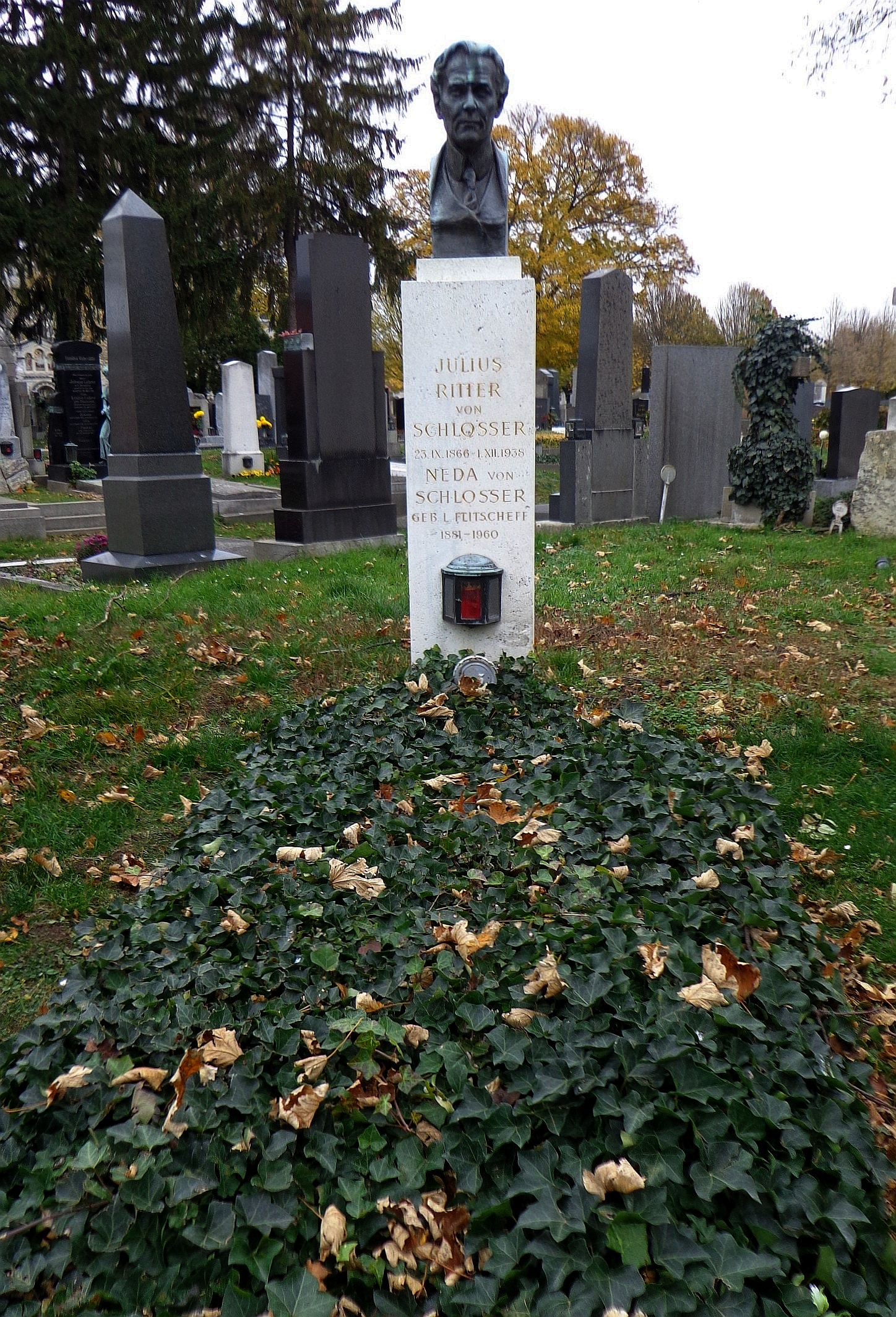 Wiener Zentralfriedhof - Gruppe 30D: Ehrengrab des Kunsthistorikers Julius von Schlosser